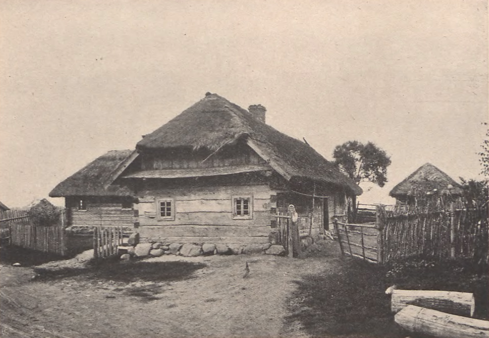 Беларуская (тарашкевіца): Поразаў (Porazaŭ). Сядзіба